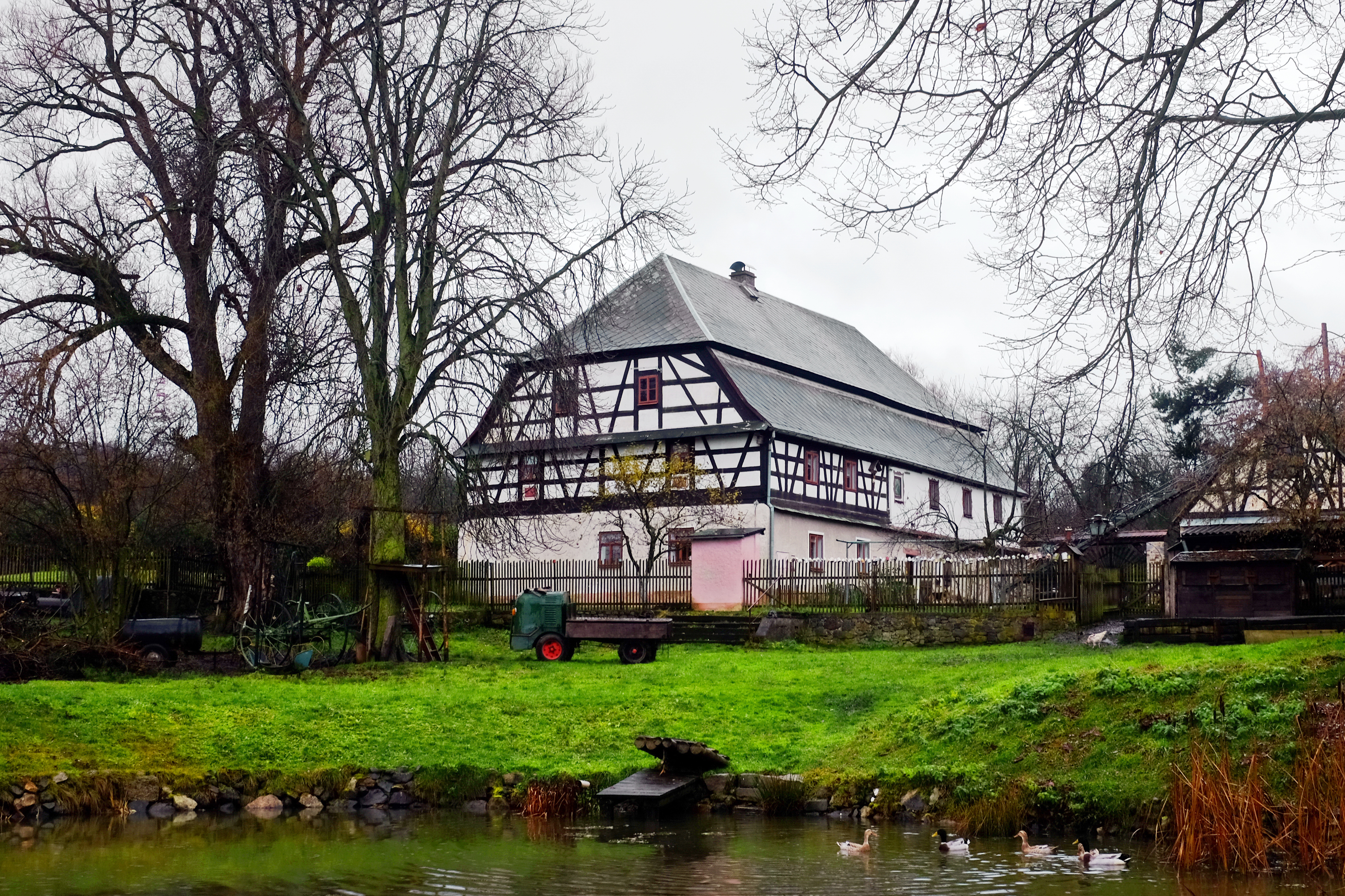 Hory, hrázděné stavení čp. 1, okres Karlovy Vary